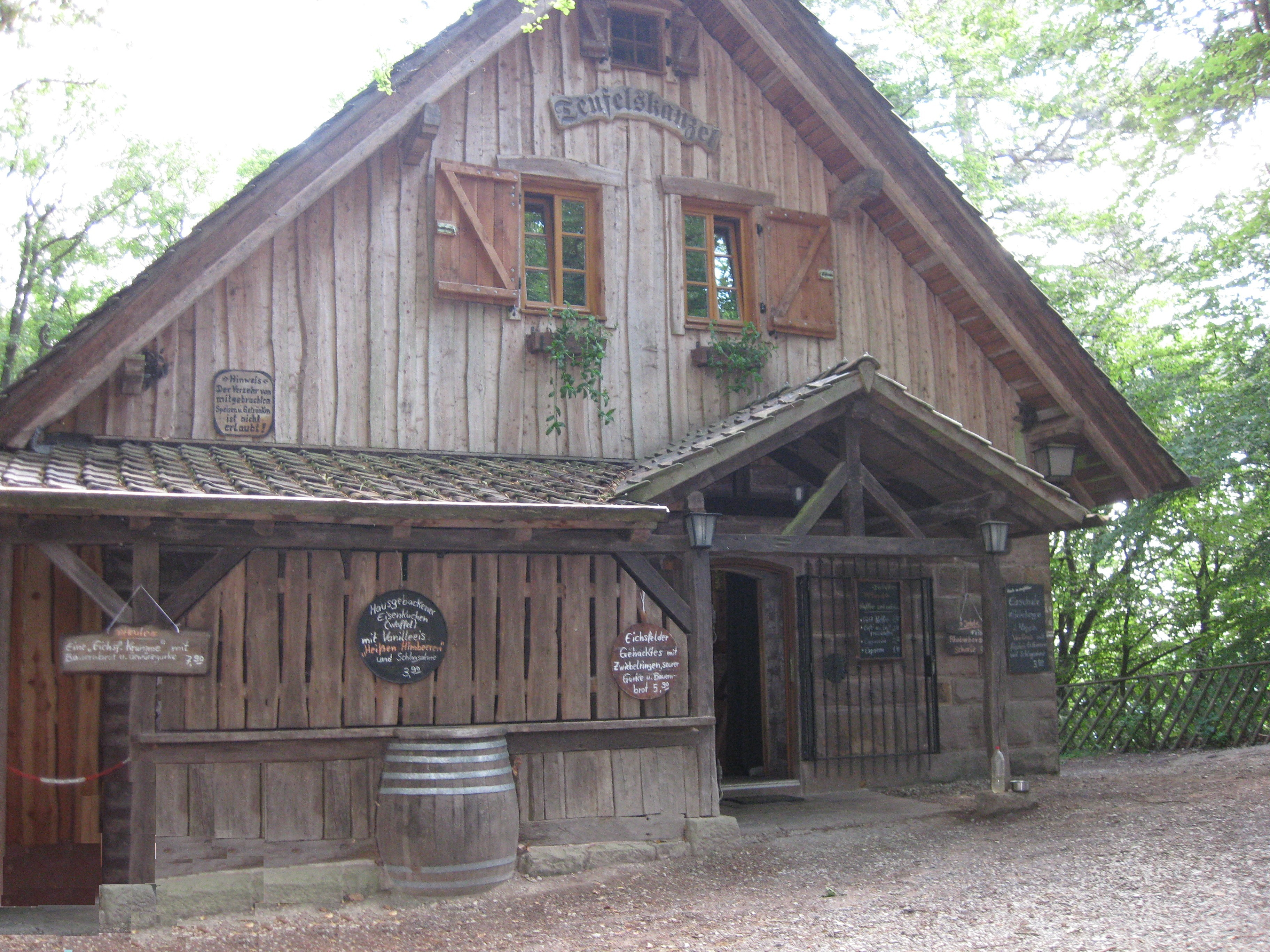 Gasthaus auf der Teufelskanzel (Eichsfeld)